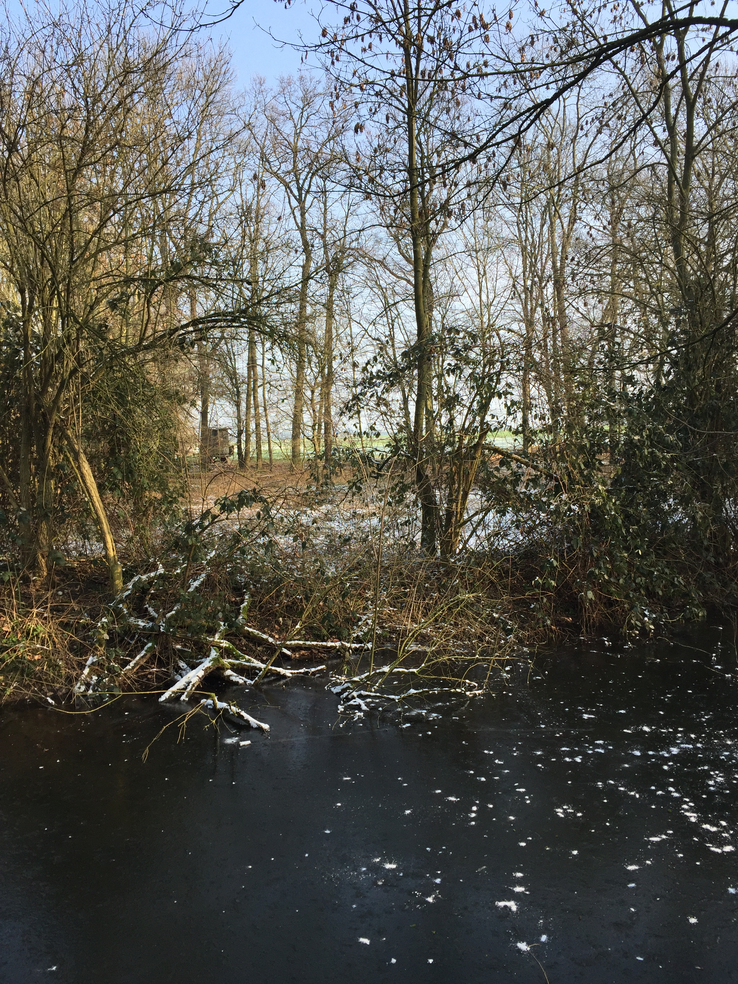 Aufnahme des Naturschutzgebietes „Große Laache“in Pulheim mit vereistem Fluss.